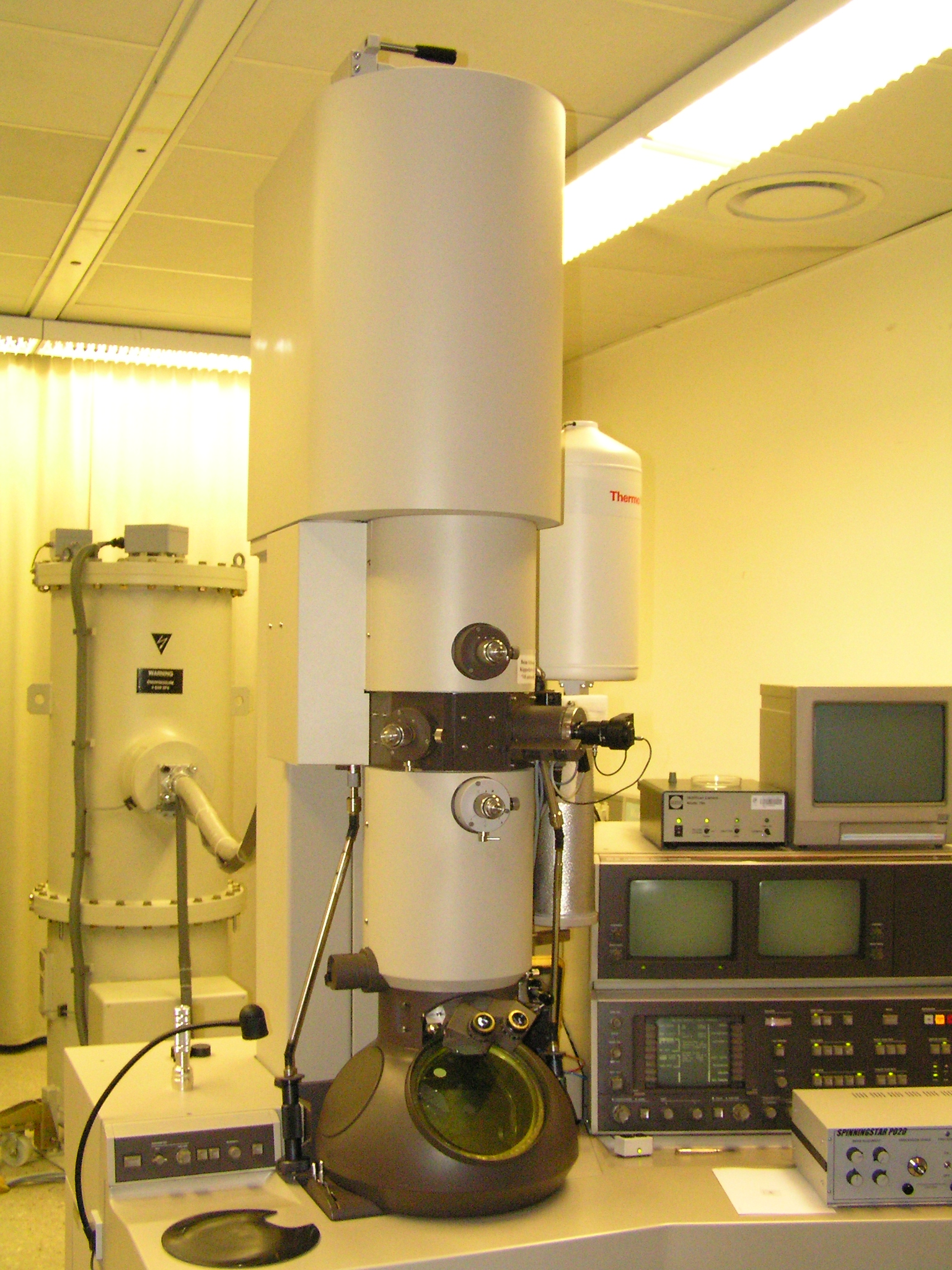 ТЕМ: Просвічуюючий електронний мікроскоп